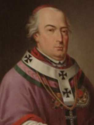 Baron Istvan Fischer de Nagy (* 21. Oktober 1754 in Bacskó, (Königreich Ungarn), heute (Slowakei); † 4. Juli 1822 in Eger, Ungarn), war römisch-katholischer Erzbischof von Eger (1807-1822) zuvor Bischof von Satu Mare (1804-1807).